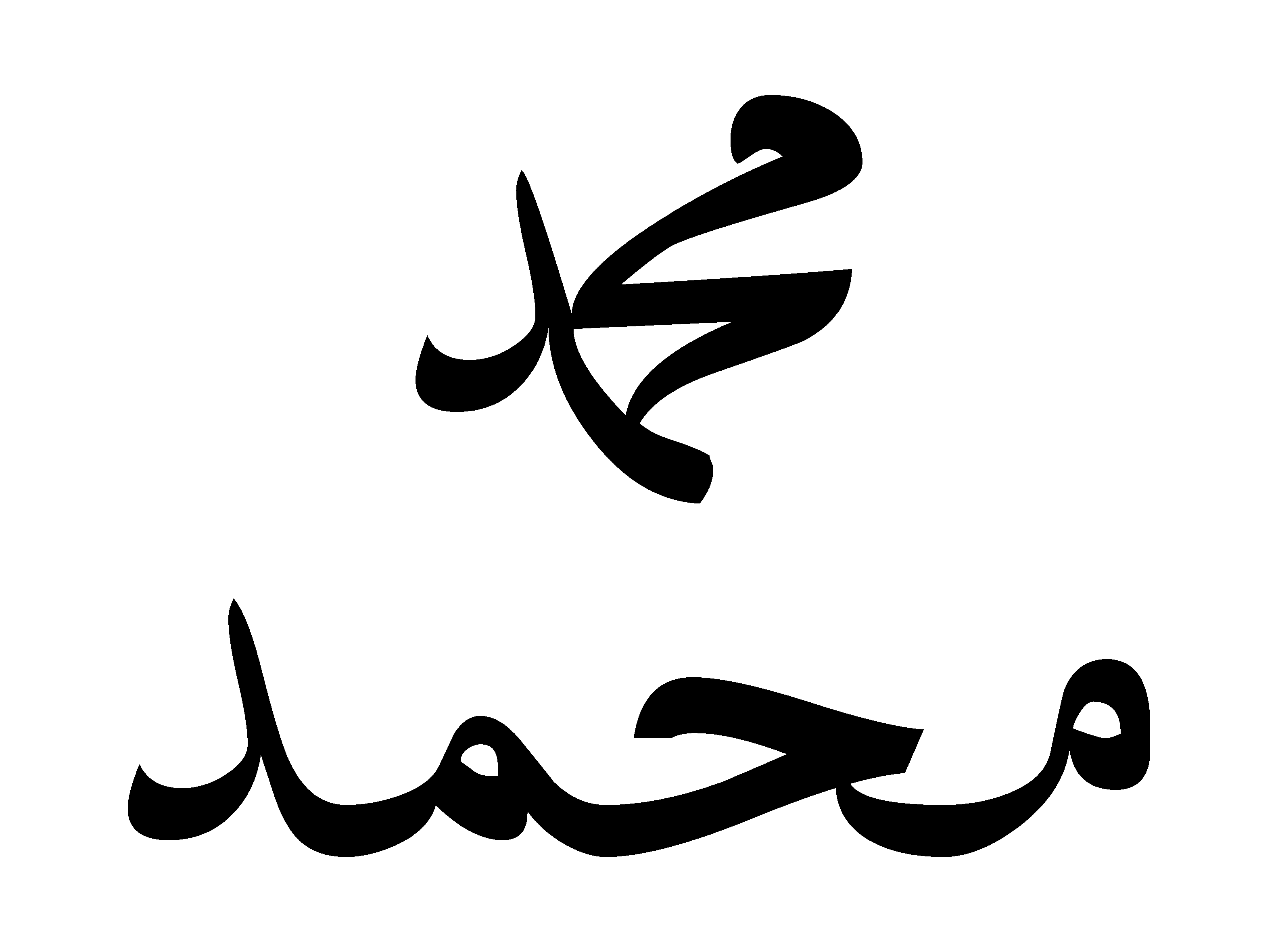 Der Name „Muhammad“ oben als Ligatur, unten ohne.